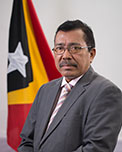 Antoninho Bianco, Abgeordneter des Nationalparlaments Osttimors